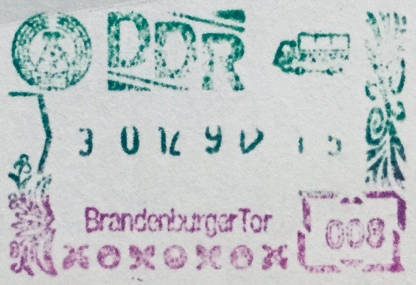 Der Einreisestempel befindet sich auf einer DDR-Zählkarte, die für Besucher aus dem Westteil der Stadt Berlin während des Aufenthaltes im Ostteil der Stadt im Reisepass mitgeführt werden musste. Bei der Ausreise aus der DDR musste diese Karte wieder abgegeben werden. Sie diente der DDR zu statistischen Zwecken.